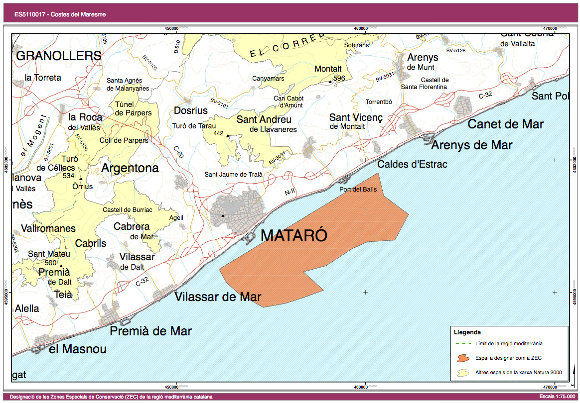 Mapa de la ZEC Costes del Maresme